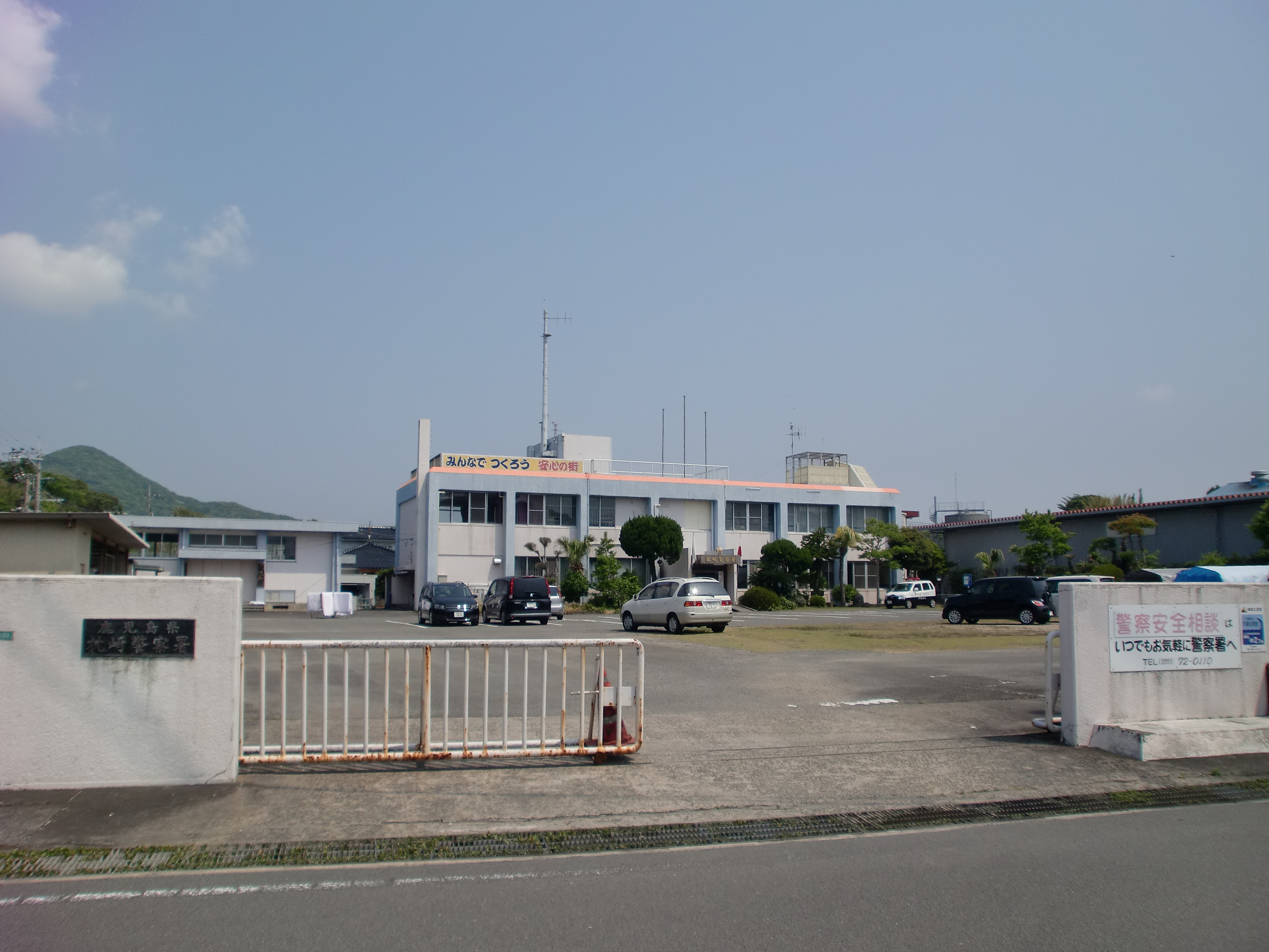 鹿児島県警枕崎警察署の外観。